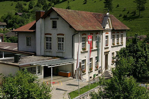 Schulhaus in Dittingen